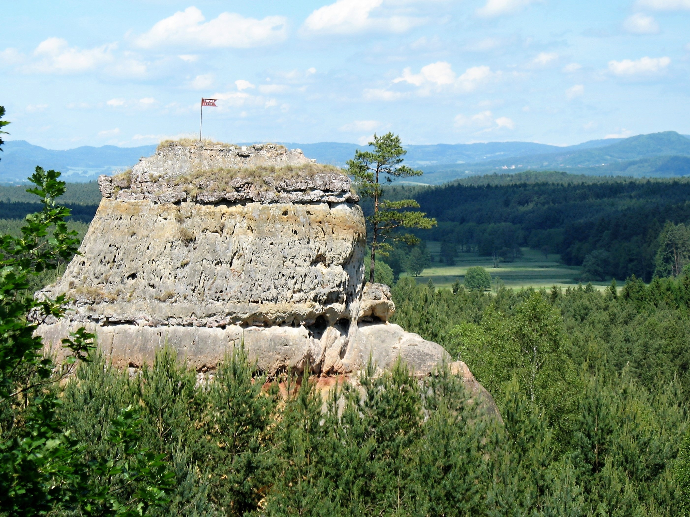 Skalní věž Tvarožník v Hradčanských stěnách